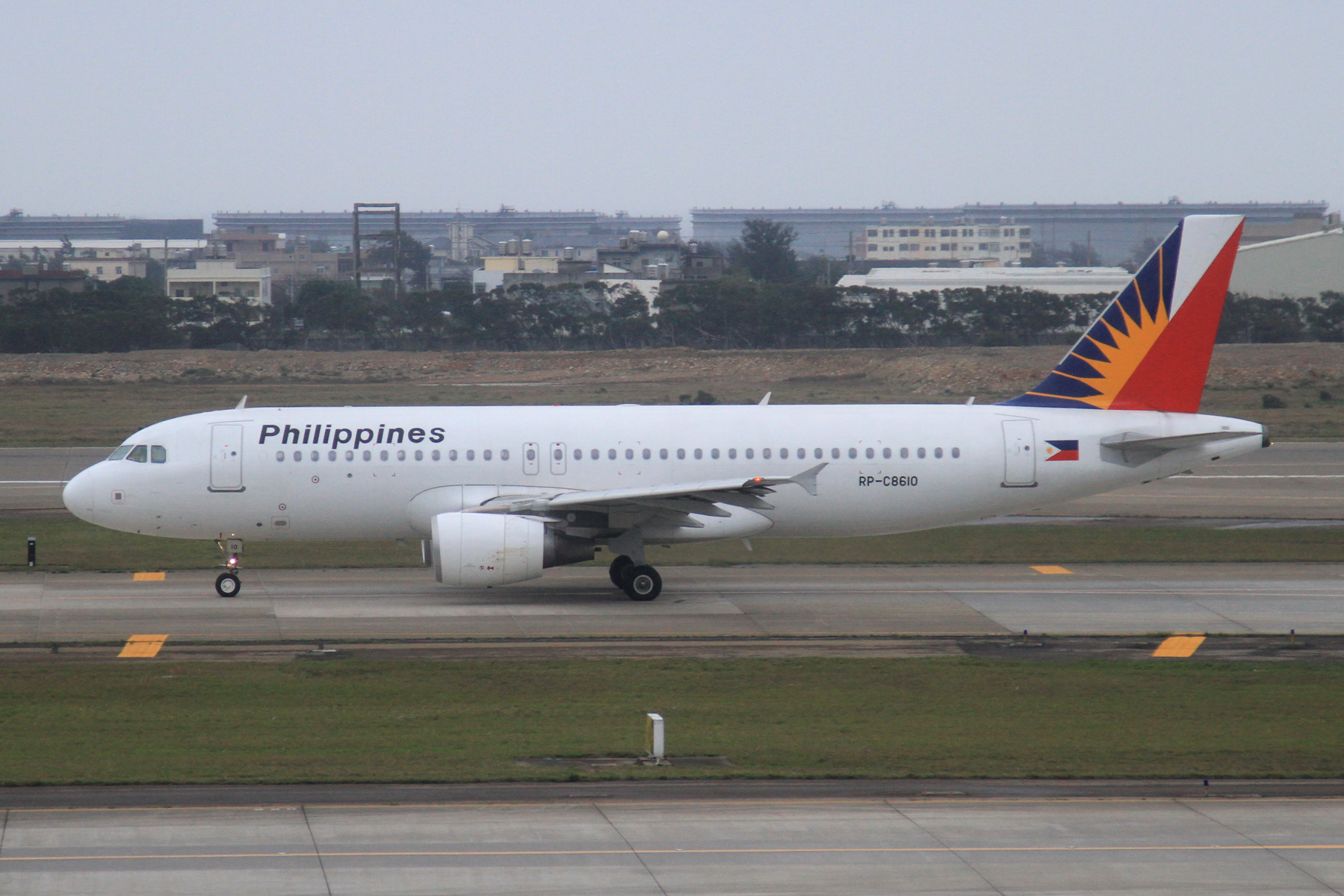 Taiwan Taoyuan Airport, Airbus A320-214, c/n:3310, Philippine Airlines